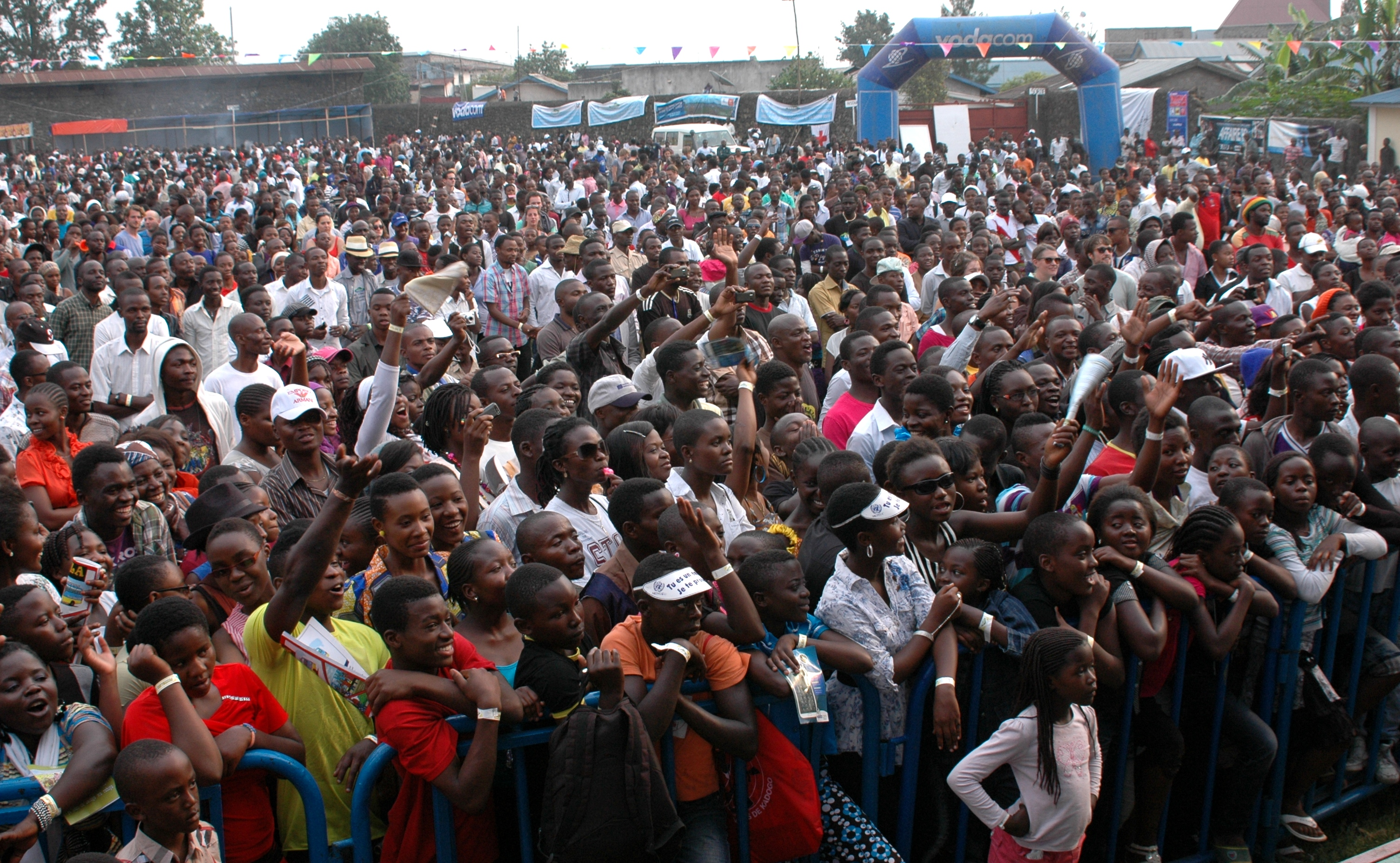 Thousands of youth gathered in Goma, North Kivu province, to celebrate Amani festival. The word “Amani” means “Peace” in Swahili, one of the local languages. The festival, which was organized under the theme “Play for Change and Sing for Peace”, took place in the regional capital of eastern D.R. Congo between 14 and 16 February 2014. The festival aimed at attracting world attention on the plight of the populations in eastern D. R. Congo through music and dance. “We Sing for Peace because it represents our hope for North Kivu. Our people have never wanted peace so badly”, the organizers of the event wrote on their website ( A dozen regionally and world known artists attended the event along with a pleiad of local ones. Photo: MONUSCO/Clara Padovan Des milliers de jeunes sont réunis à Goma pour célébrer le festival « Amani » qui signifie « la paix » en Swahili, une des langues de la région. Le festival qui était organisé sous le thème « Danser pour Changer, Chanter pour la Paix », s’est déroulé du 14 au 16 février dans la capitale régionale de l’Est de la R. D. Congo. Il avait pour but d’attirer l’attention du monde sur la condition des populations vivant à l’Est de la R. D. Congo à travers la musique et la danse. « Nous chantons la Paix car elle est notre seul espoir pour le Nord-Kivu et notre population ne l’a jamais autant désirée », ont écrit les initiateurs de ce festival sur leur site web ( Une douzaine d’artistes de renommée régionale et mondiale avaient pris part à ce festival aux côtés d’une pléiade d’autres artistes locaux. Photo : MONUSCO/Clara Padovan